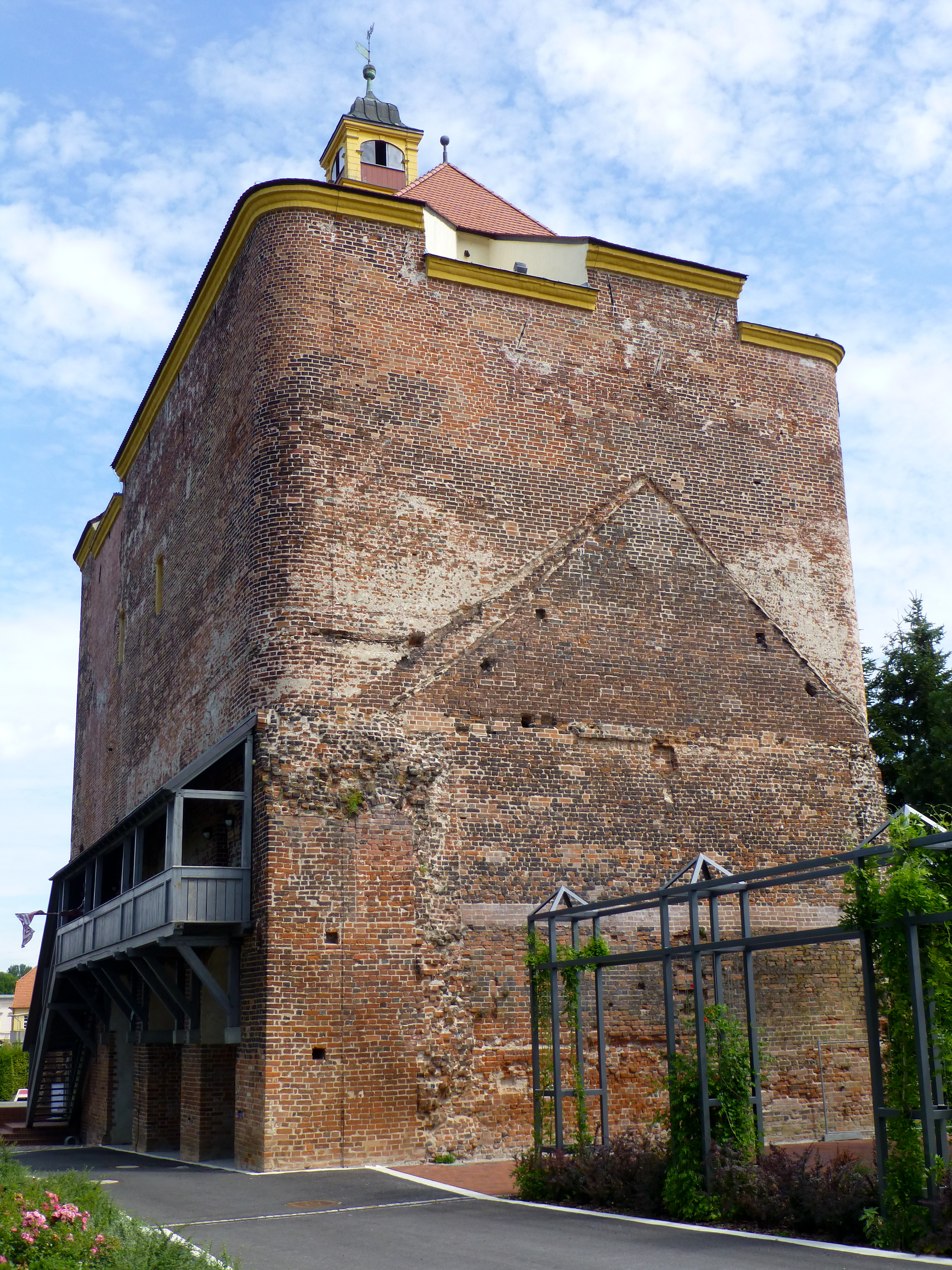 Festungsturm der früheren Festung in Peitz in Brandenburg